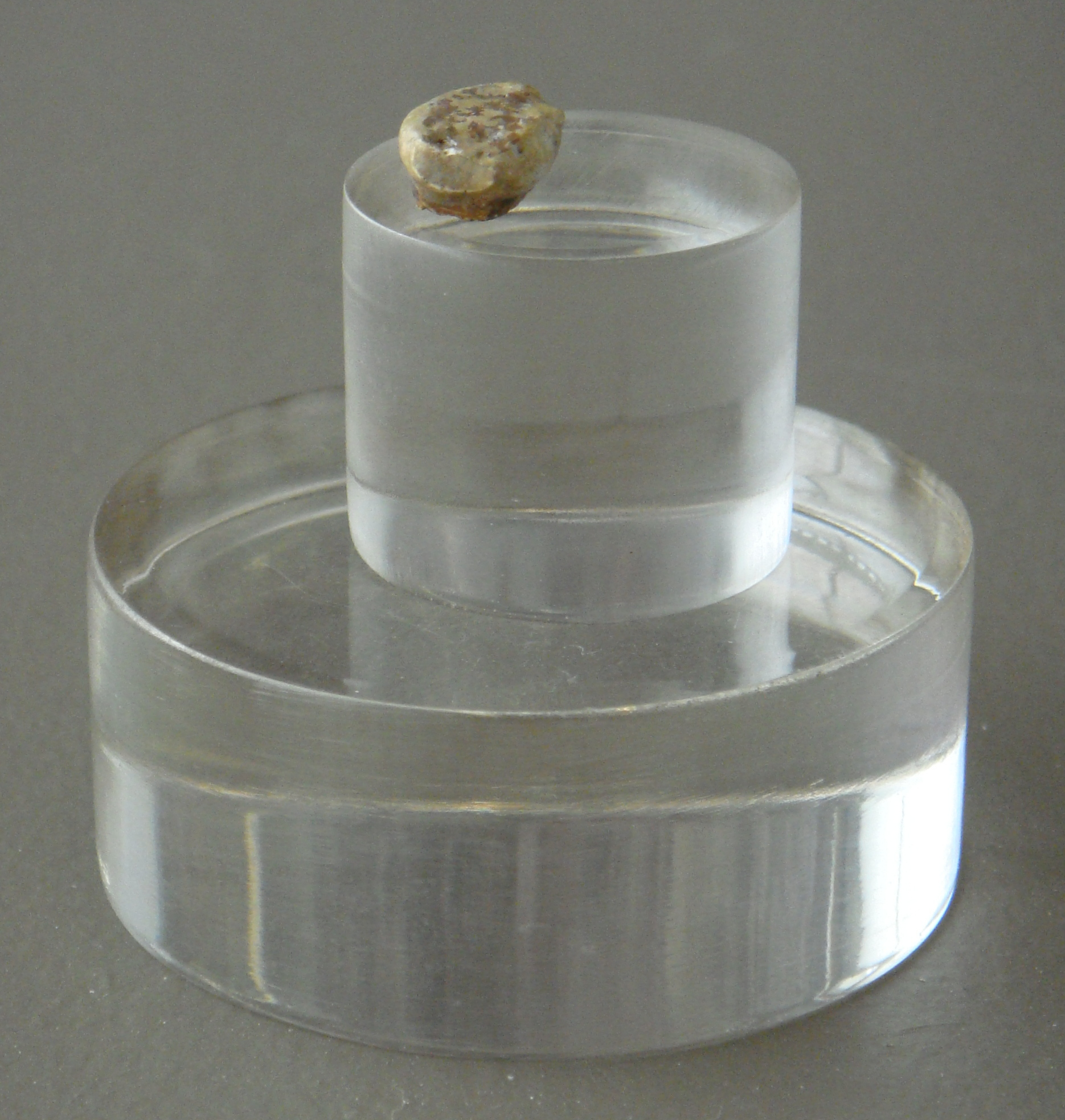 Museo de Prehistoria de Orce